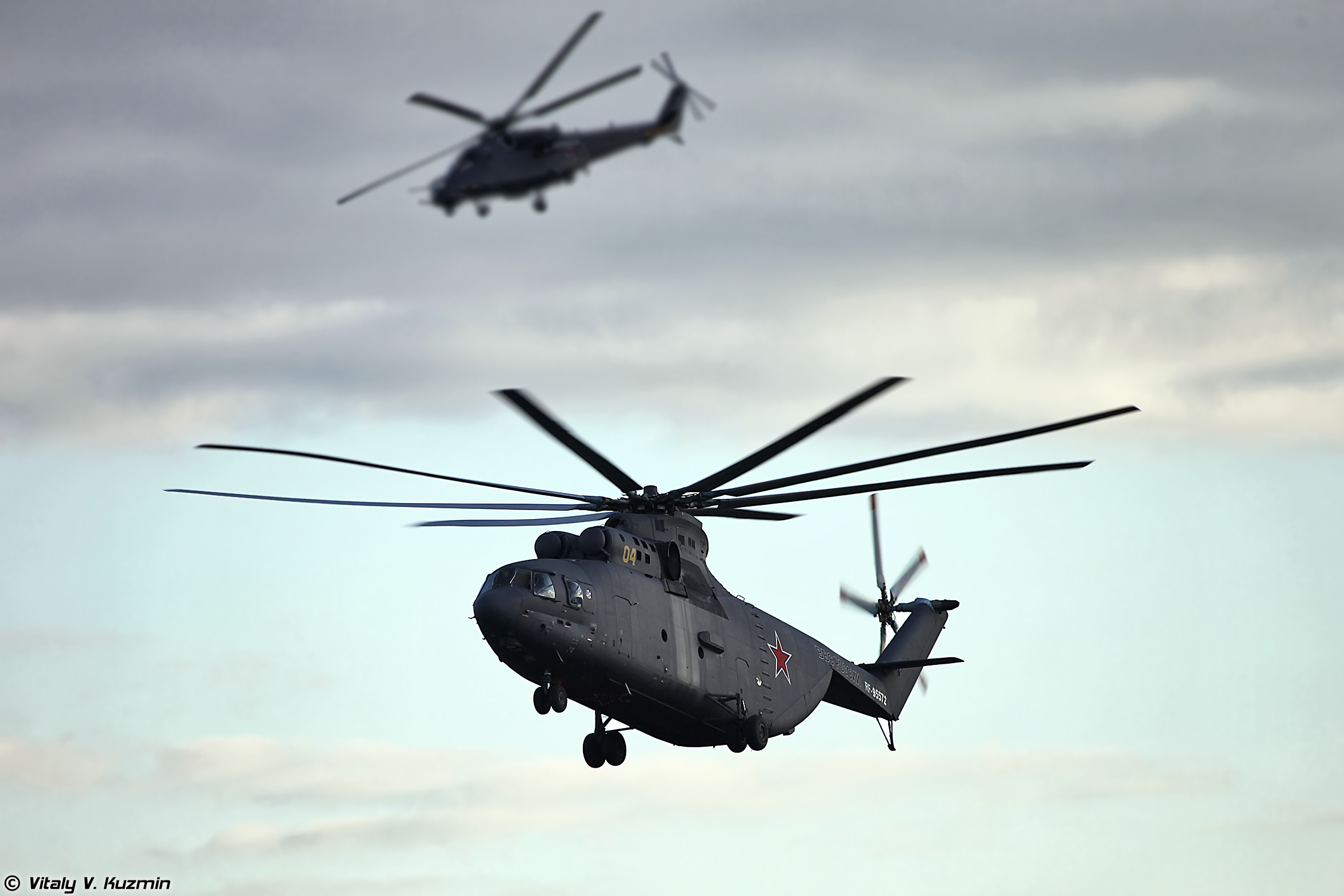 Показательное выступление Зубра началось с авиационной поддержки, два Ка-52 нанесли удар по базе террористов. Затем пошла высадка штурмовой группы на Тиграх. (Demonstration started with air strike by two Ka-52, after that Mi-26 airlanded assault group with GAZ-233036 SPM-2